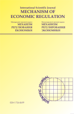 обкладинка журналу